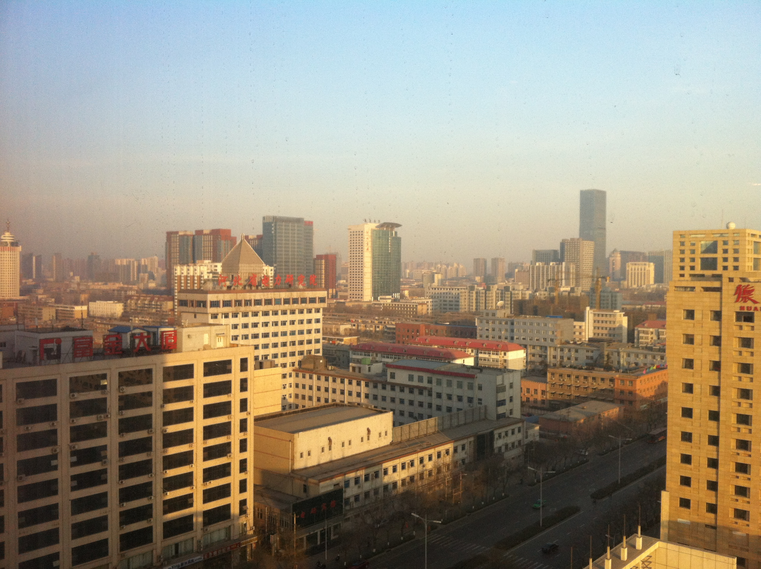 懷特區